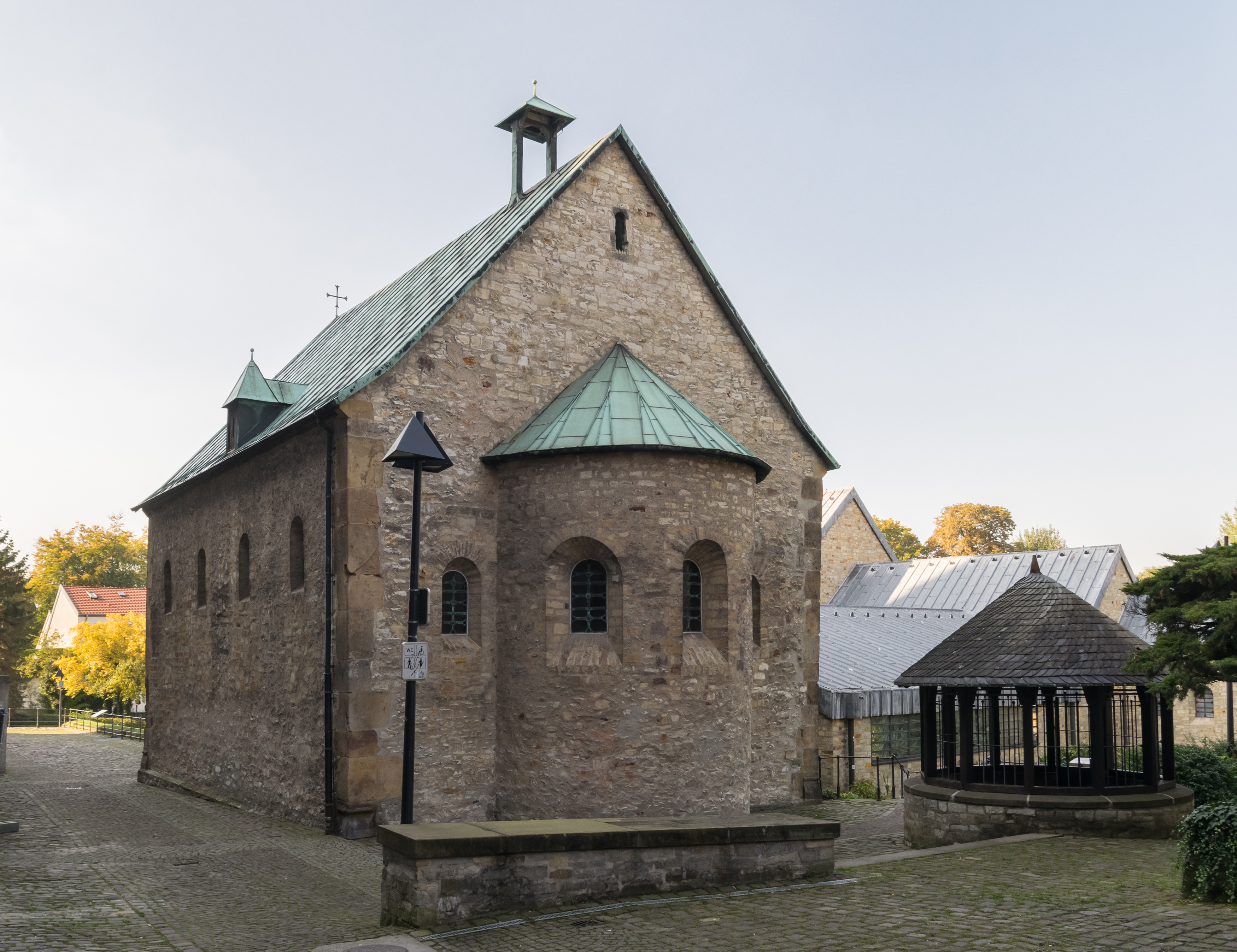 Bartholomäuskapelle in Paderborn neben dem Dom